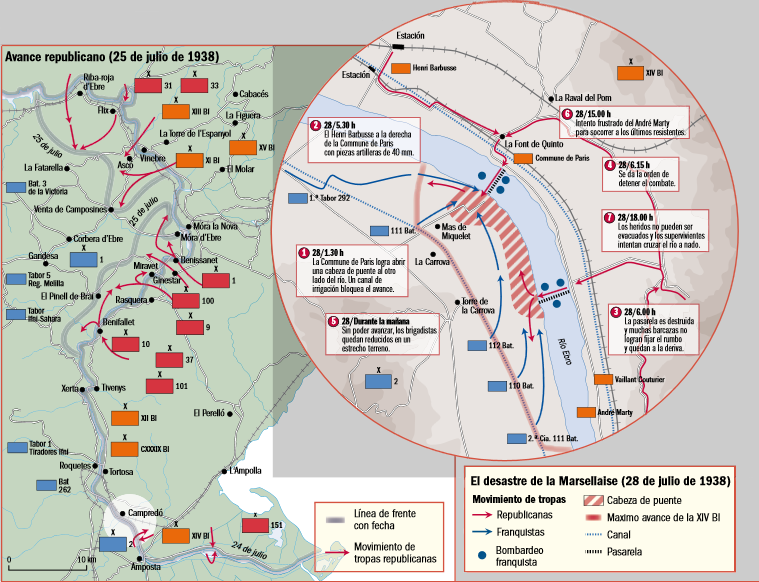 Movimientos de tropas en el inicio de la batalla del Ebro.